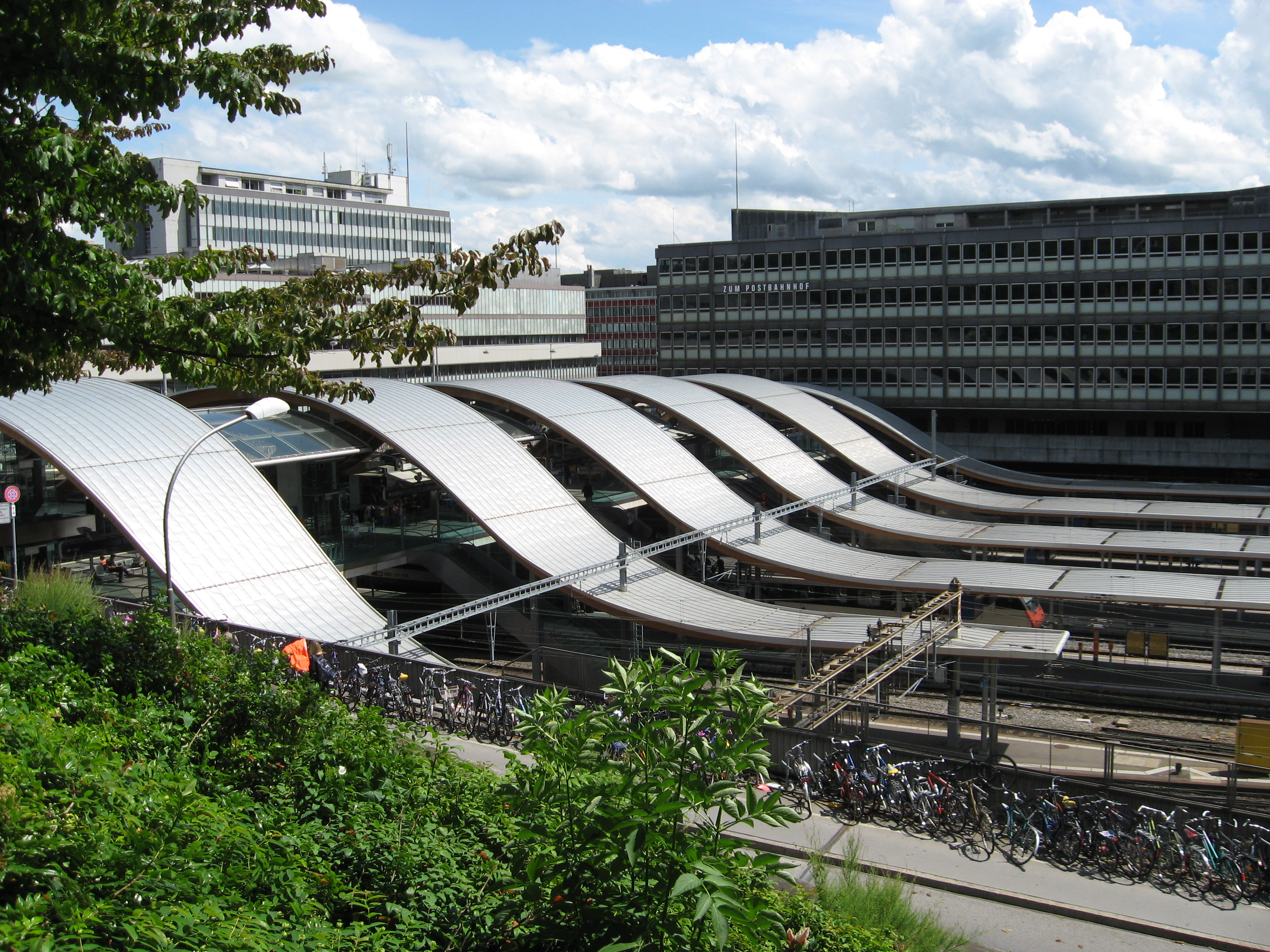 «Welle von Bern» (Bern Bahnhof)